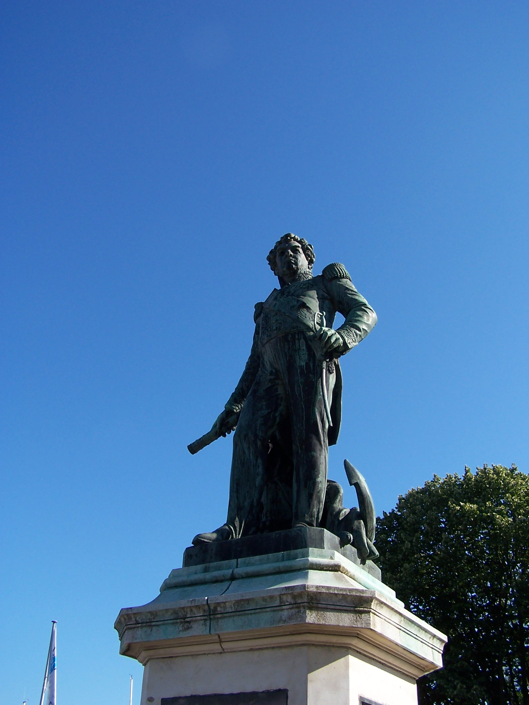 Photographie de la statue de l'Amiral Duperré trônant sur le Vieux-Port de La Rochelle.